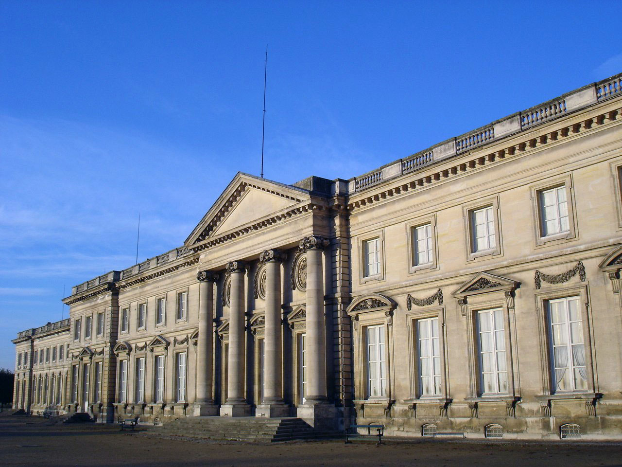 la façade côté jardin du château de Compiègne (Oise, France) ; le château actuel est élevé principalement de 1751 à 1789